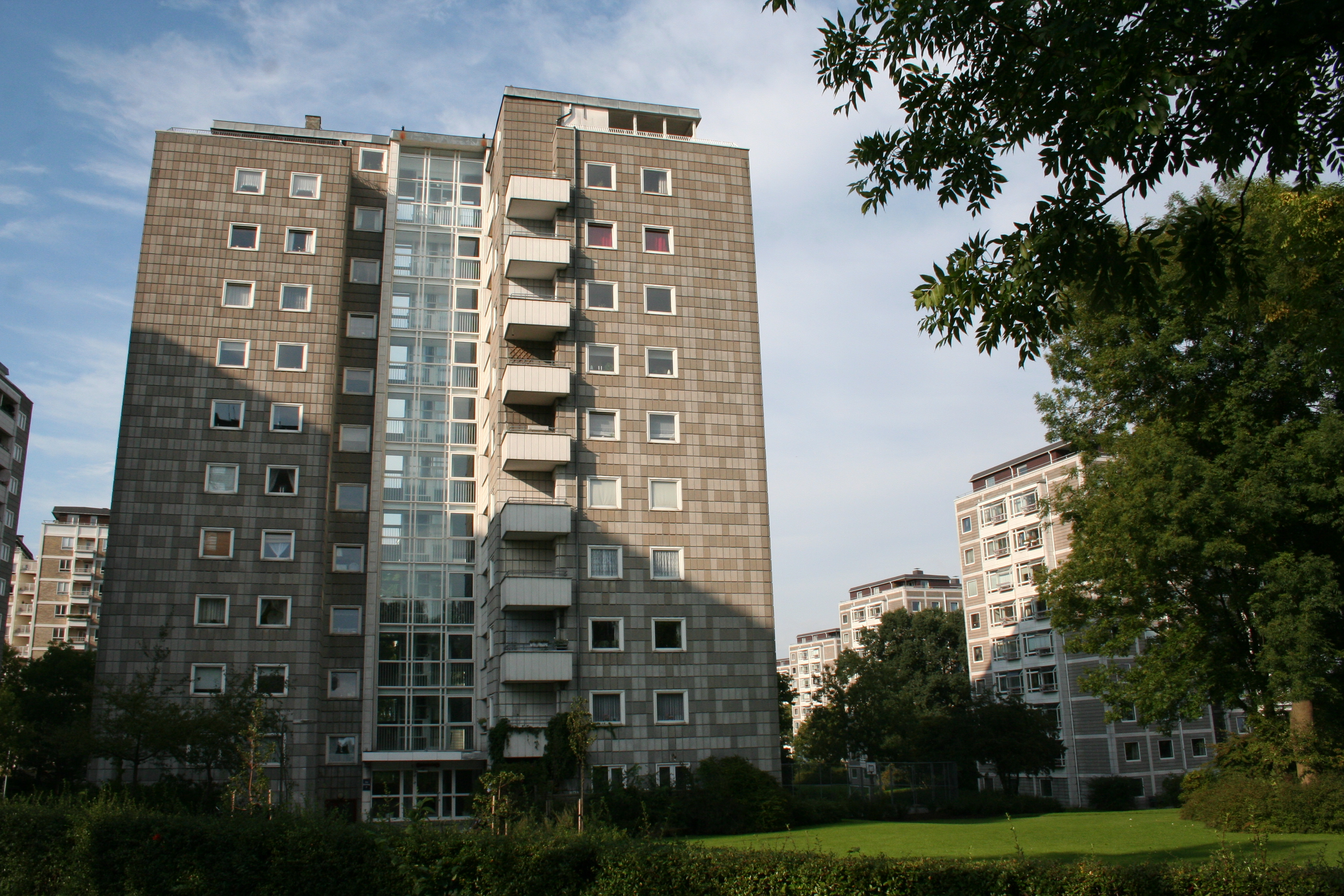 Højhusene Ved Bellahøj